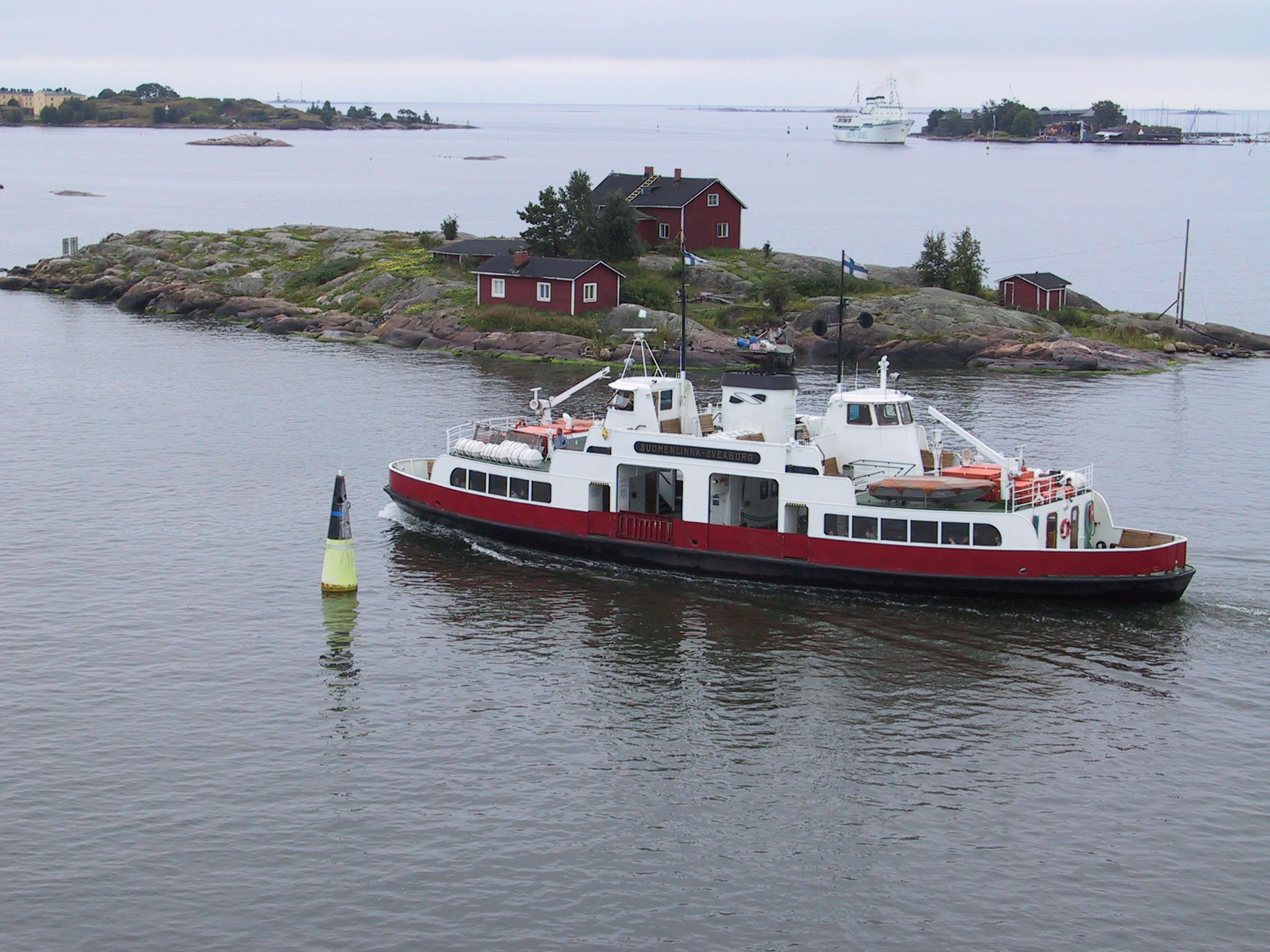 M/S Suomenlinna-Sveaborg in front of Ryssänsaari